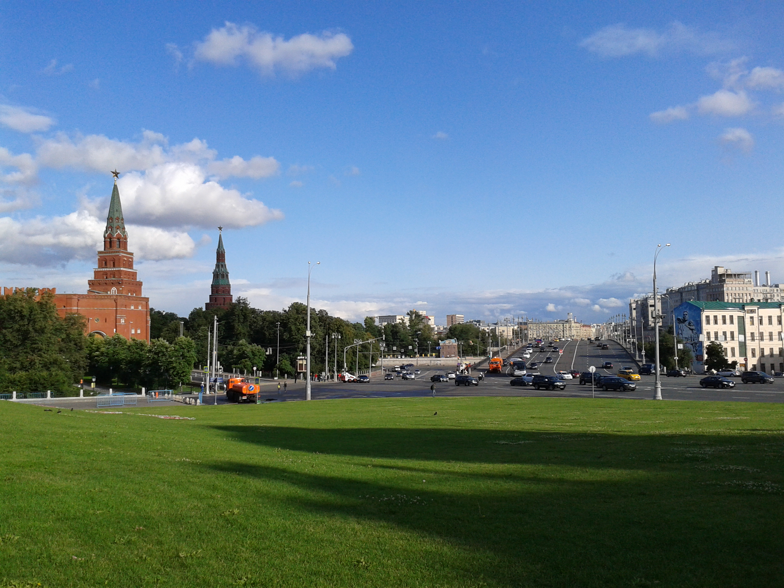 "Холм Никсона" (пока ещё без Владимира)